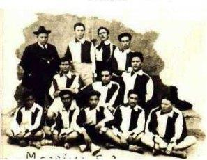 Messina football picture from 1910, source [1] . Featured: a leader, Grigio, Gismondo Giuseppe, Salvato, Caccamo, Colarese, Messina Enzo, Musolino, Gregorio Stellario, Barone Pasquale, Pappalardo, Muscarini.